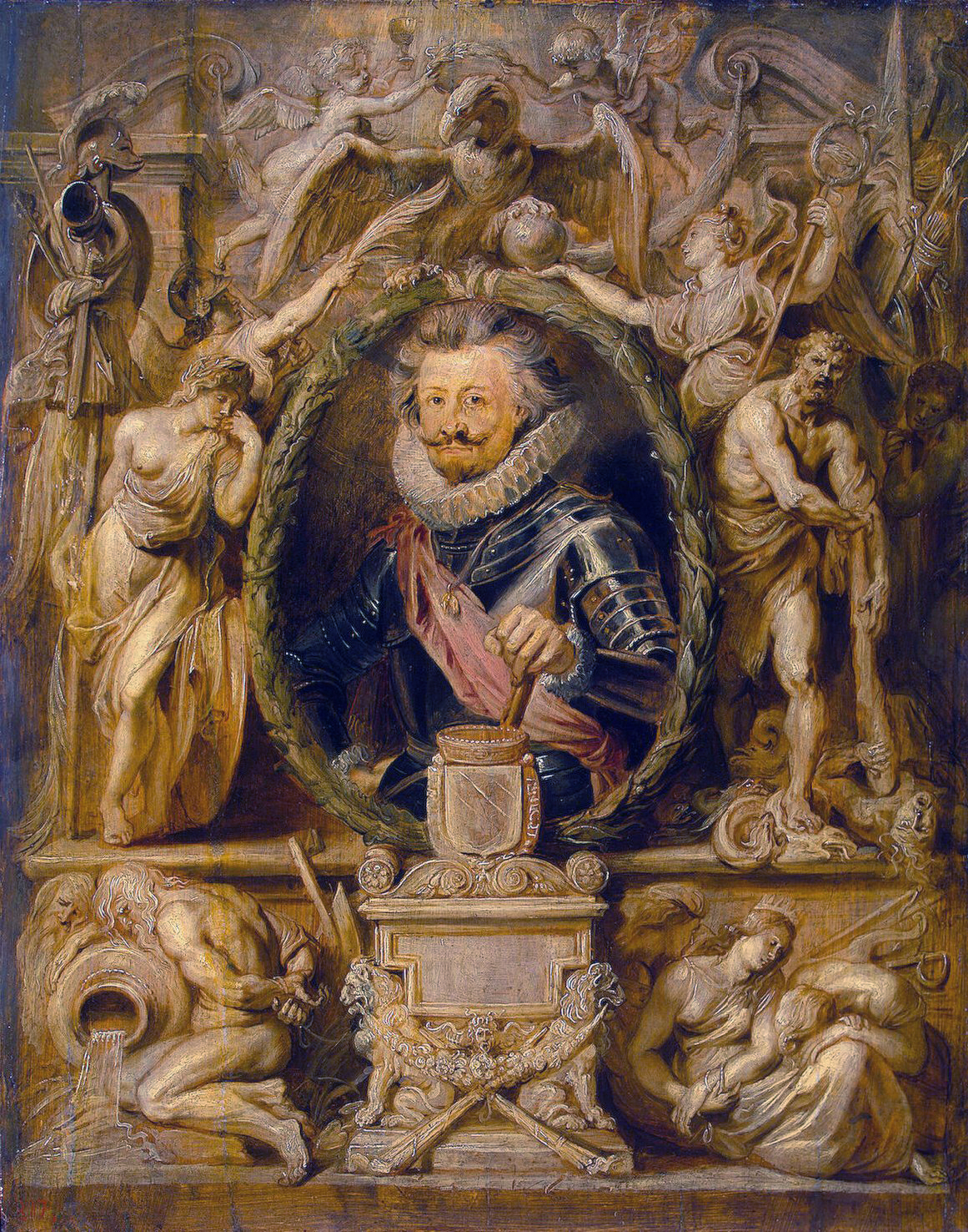 Charles Bonaventura de Longueval, Count de Bucquoi